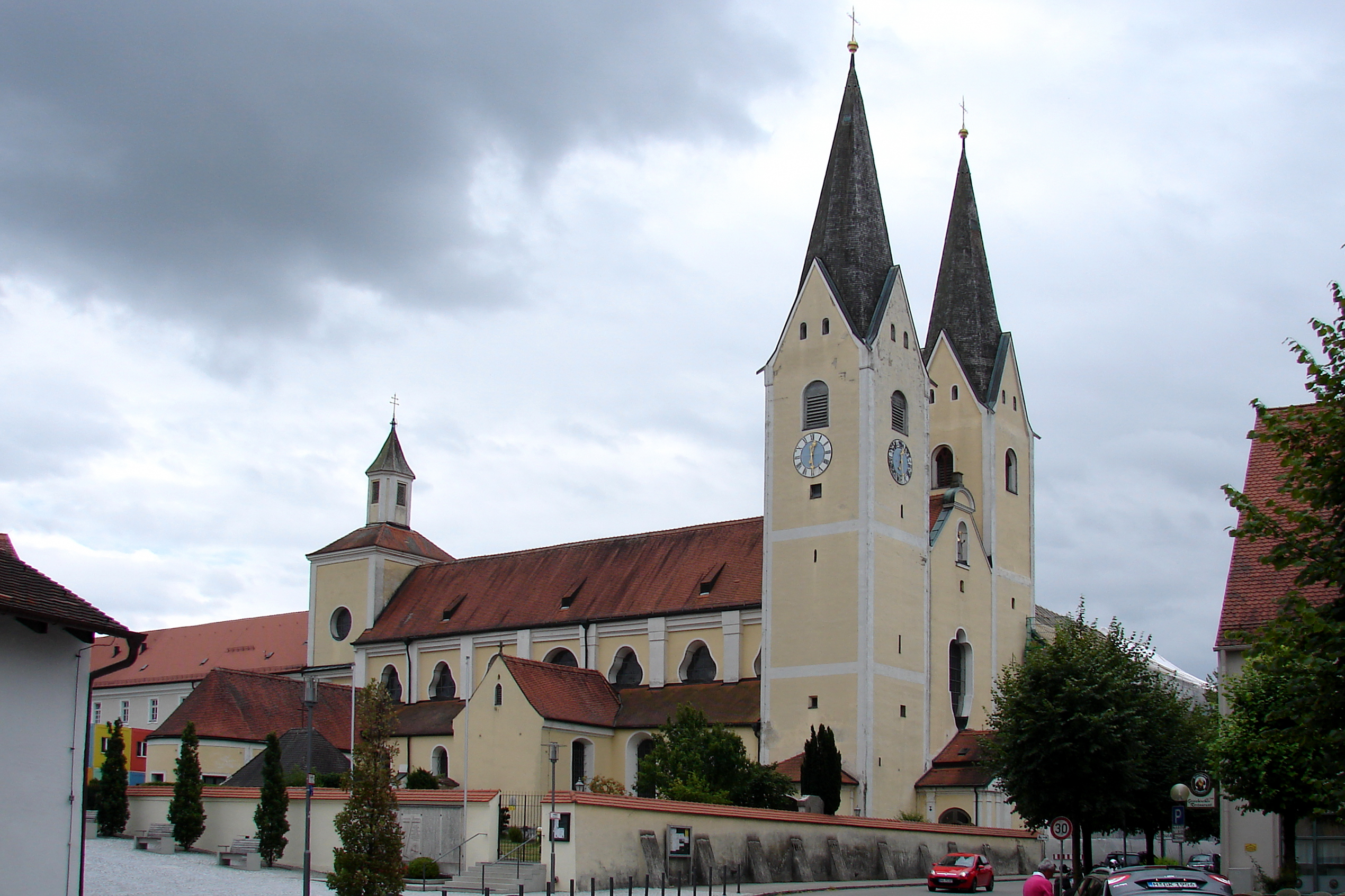 Das Kloster Indersdorf ist ein ehemaliges Kloster der Augustiner-Chorherren und späteres Kloster der Salesianerinnen in Markt Indersdorf in Bayern in der Erzdiözese München und Freising.